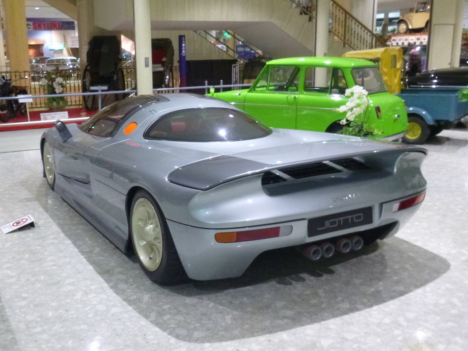 ジオット キャスピタ 1号車（日本自動車博物館所蔵）